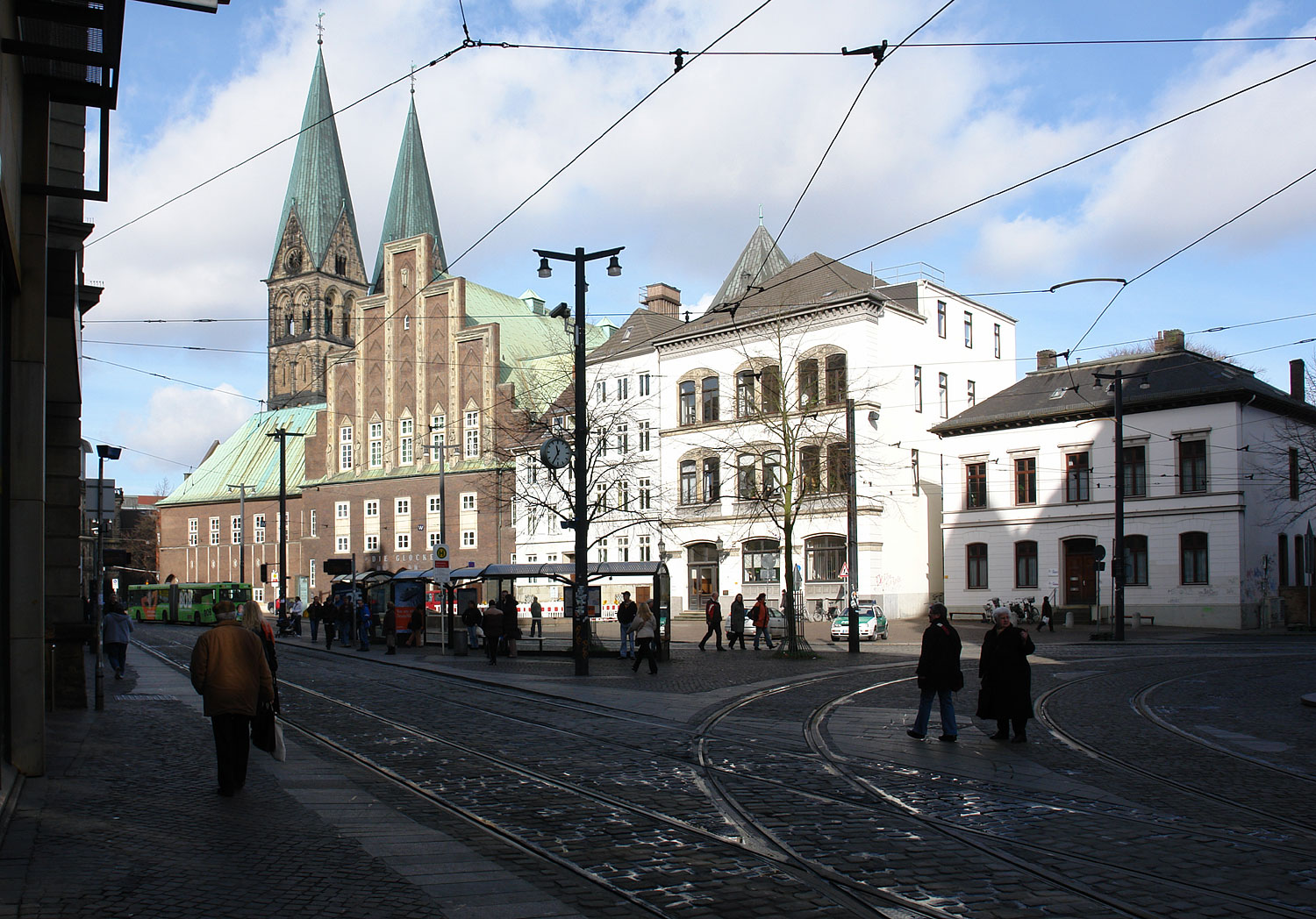 Bremen: Blick vom alten Postamt auf die Domsheide. Mit Stufengiebel das Konzerthaus Die Glocke, daneben die Domtürme Die Denkmalgruppe ist ein geschütztes Kulturdenkmal in der Freien Hansestadt Bremen, mit der Nr. 0315 beim Landesamt für Denkmalpflege registriert.